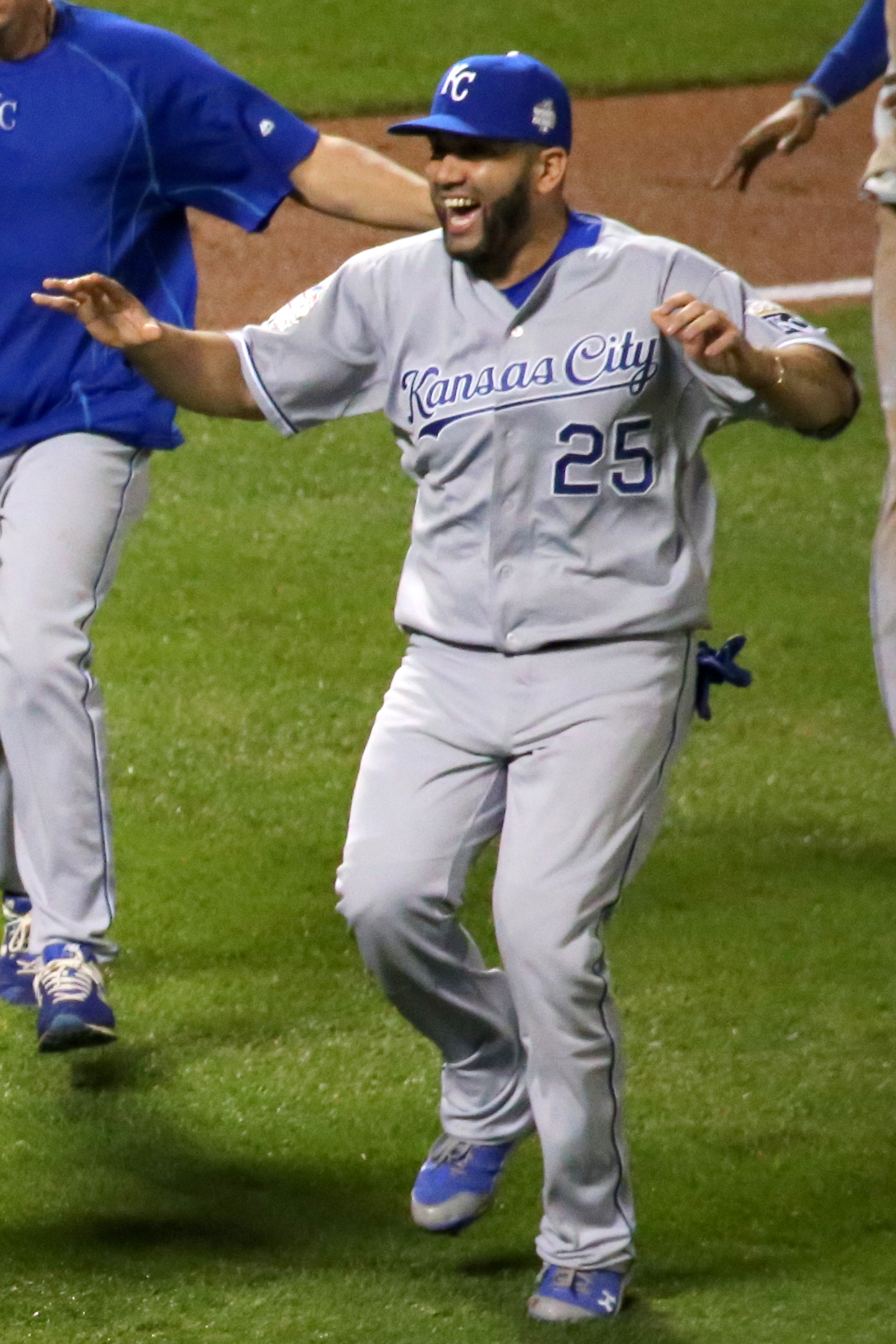 Kendrys Morales